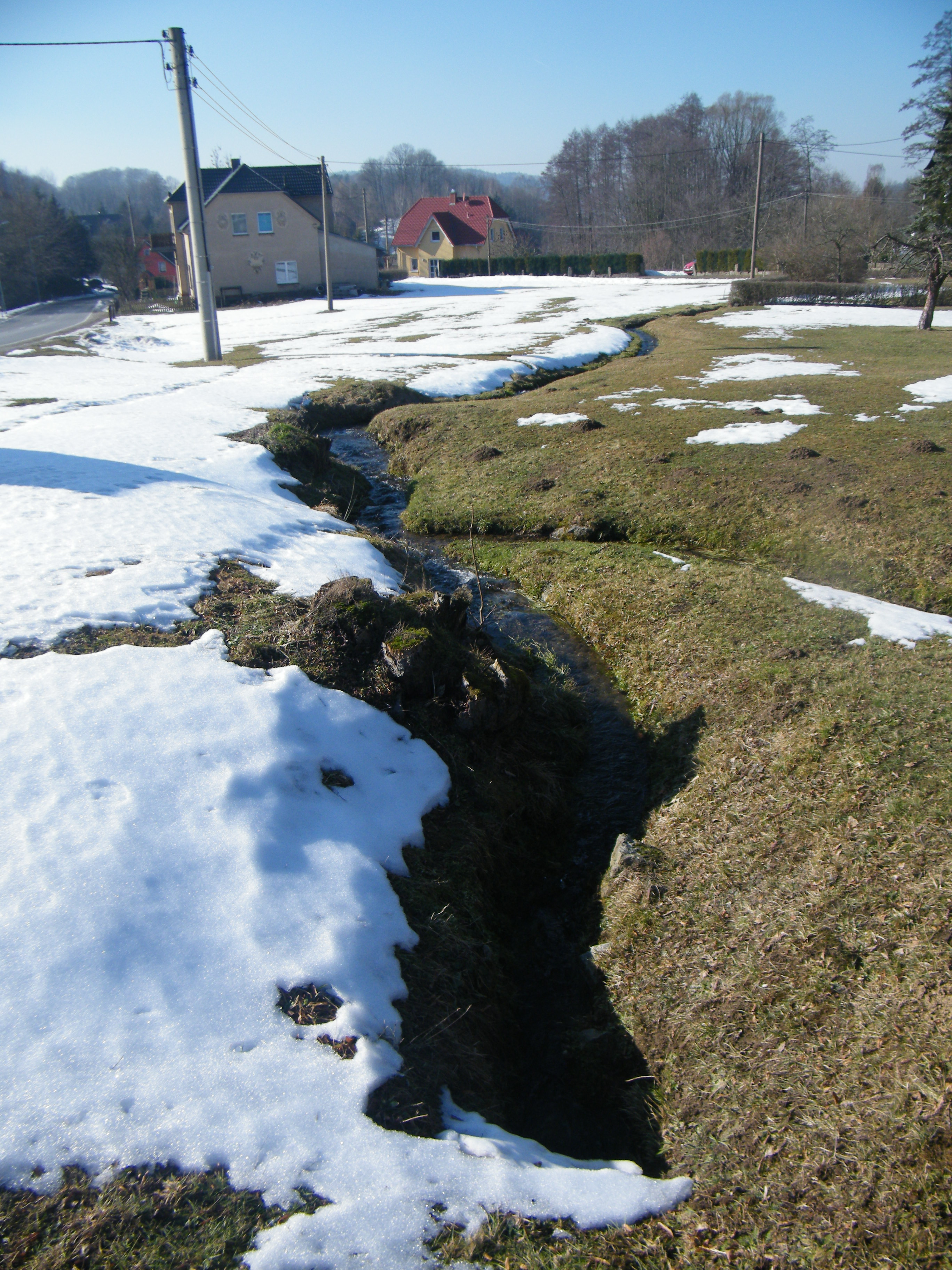 Hertigswaldský potok v horní část Hertigswalde